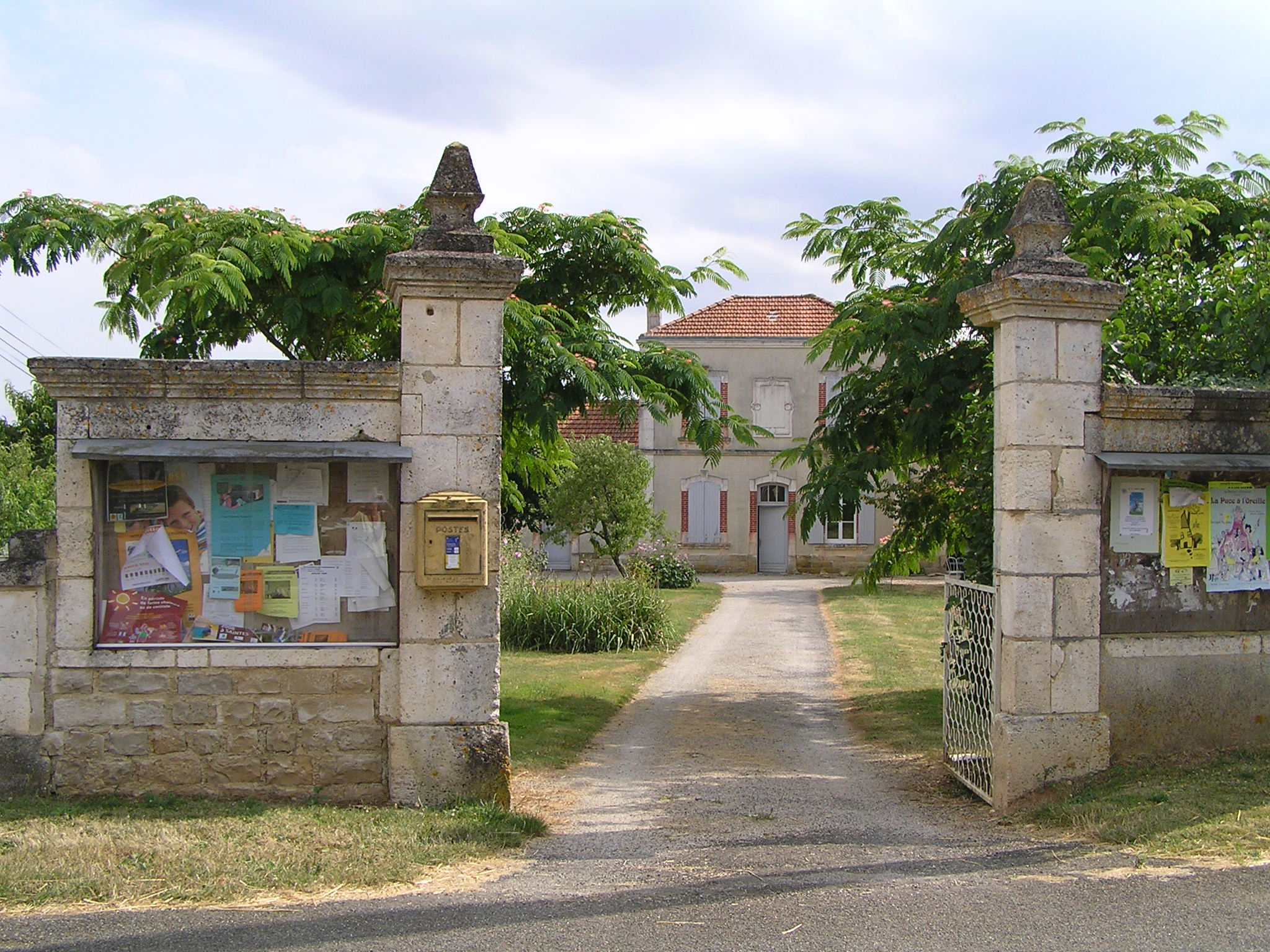 mairie de La Magdeleine